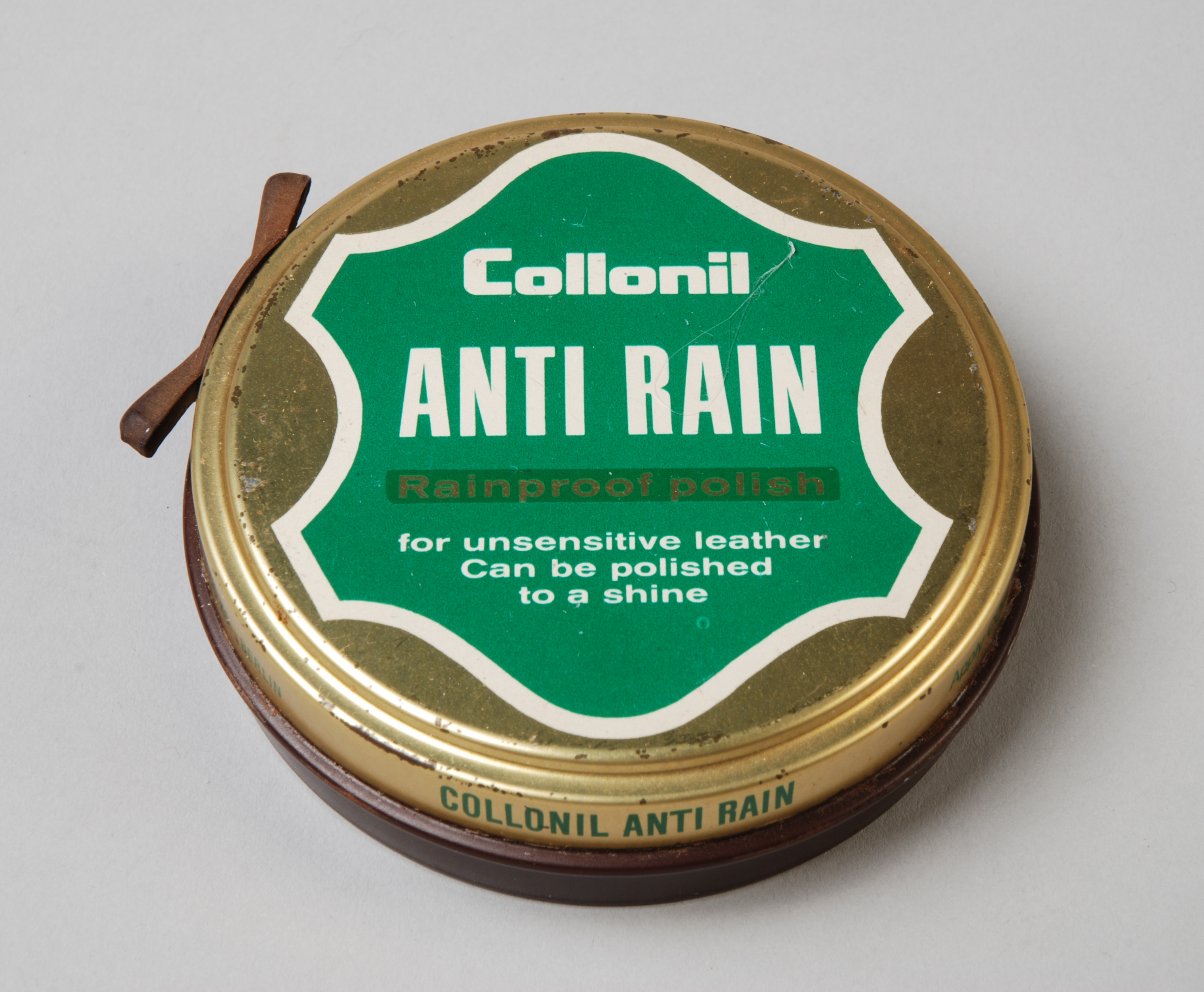 Objectgegevens Titel: Klein rond blik met door middel van draaibaar vleugeltje te openen klemdeksel, “Collonil, rainproof polish”, groen en goudkleurig Beschrijving: Klein rond blik met op deksel productnaam op groen fond. In blik restant bruin Materiaal: . Blik bruin van kleur. Herkomst: Collectie Meijer, Rotterdam. Trefwoorden: schoenpoetsblik, blik, productverpakking, houder Opschrift / merk: Deksel: "Collonil / ANTI RAIN / Rainproof polish / for unsensitive leather", "Can be polished / to a shine". Dekselrand: "COLLONIL ANTI RAIN", "Apply COLLONIL ANTI RAIN with a cloth sparingly, brush your shoes to a shine and walk out into the rain ... smiling", "SALZENBRODT & CO. KG. - BERLIN". Binnenkant deksel: kwaliteitsaanduiding, gebruiksaanwijzing, "Verkrijgbaar in: / lichtbruin - bruin - oxblood / zwart - kleurloos", "MADE IN GERMANY". Onderkant: onduidelijk merkteken [verdiept]. Vervaardiger: opdrachtgever: Salzenbrodt & Co, Kg Plaats vervaardiging: Duitsland Datering: 1970 - 1980 Technieken: blik, vertind, geperst materiaal metaal, verf Afmetingen: (cm) hg 2,0 / dm 8,0 Associatie: reclame, verpakken, poetsen, schoen poetsen, onderhoud, leer, kleding, Salzenbrodt, Berlijn Vorm & decoratie: verpakking Inventarisnr: Museum Rotterdam 78227-A-B